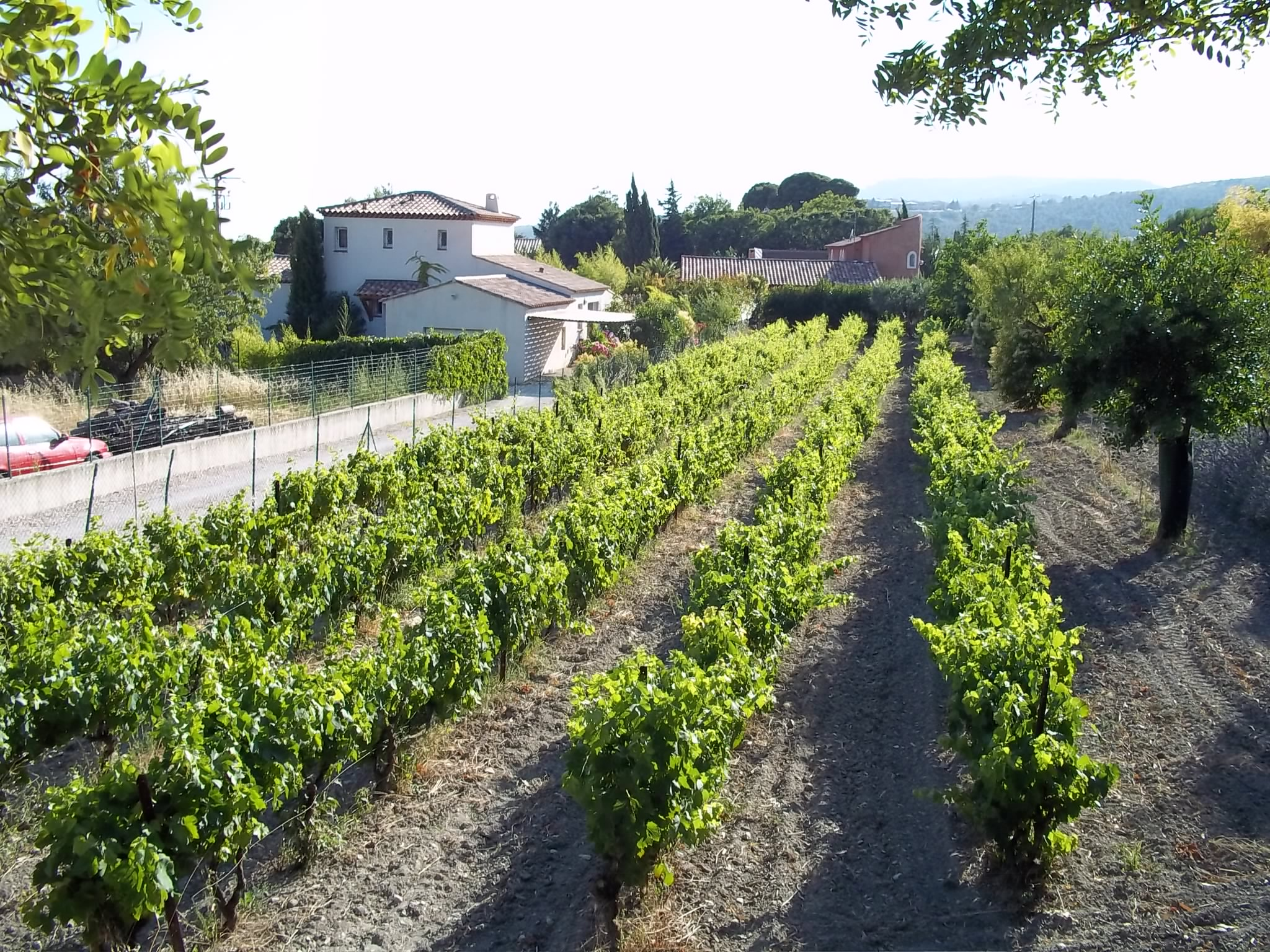 Vignes de Cassis